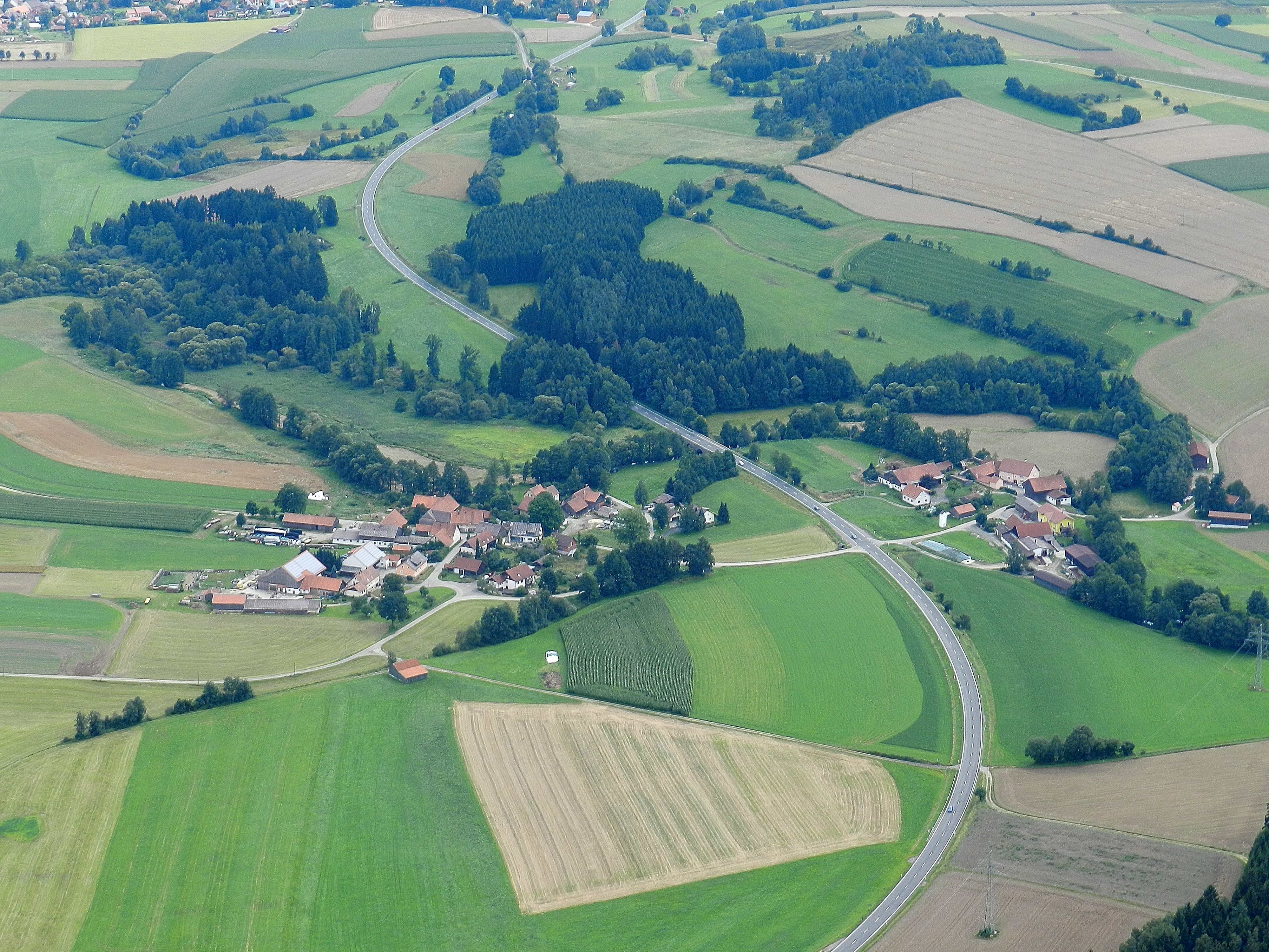 Obereppenried (links), Bundesstraße 22 (Bildmitte), Untereppenried (rechts); Markt Winklarn, Landkreis Schwandorf, Oberpfalz, Bayern